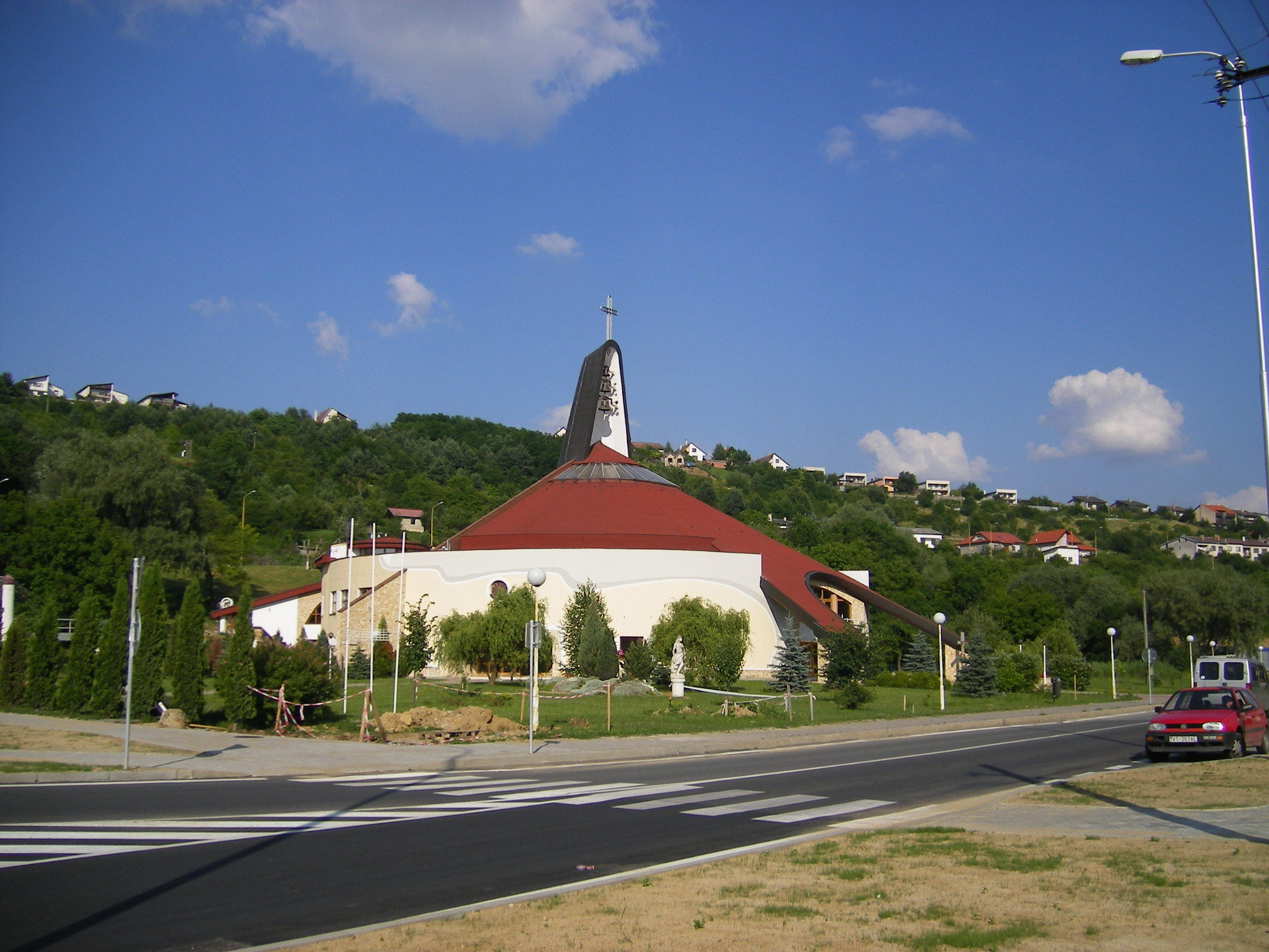 Vranov nad Topľou